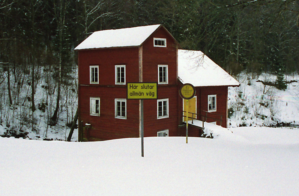 Norrga kvarn med äldre vägskylt.